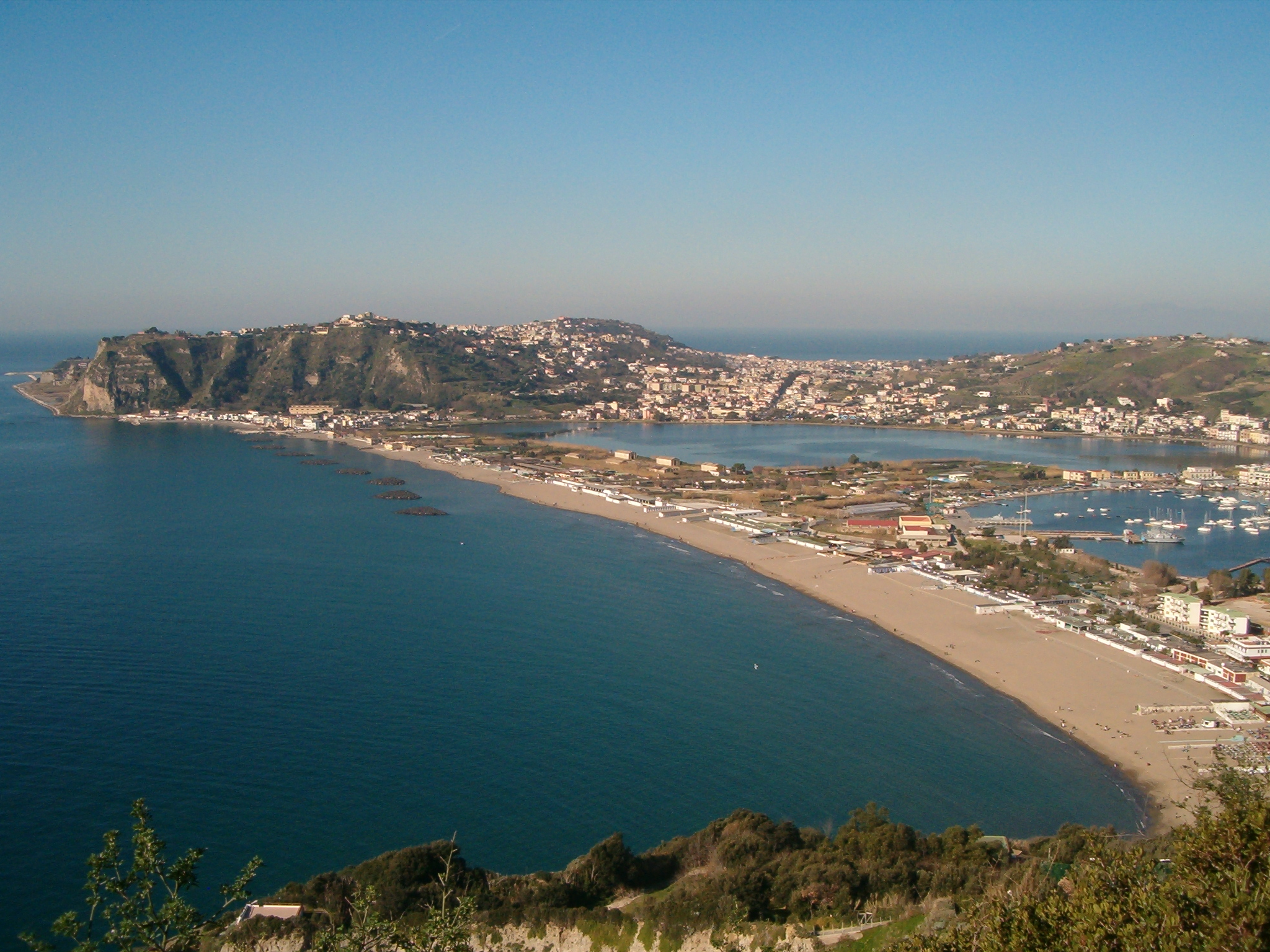 Veduta da Capo Miseno su Monte di Procida, ai piedi del quale vi è Cappella, una frazione del Comune di Bacoli che si affaccia sul Lago Miseno, mentre in primo piano vi è la spiaggia di Miliscola.